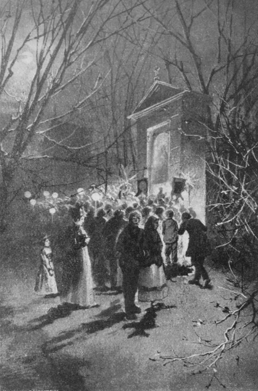 Procesí na Petříně v noci o Velikém pátku